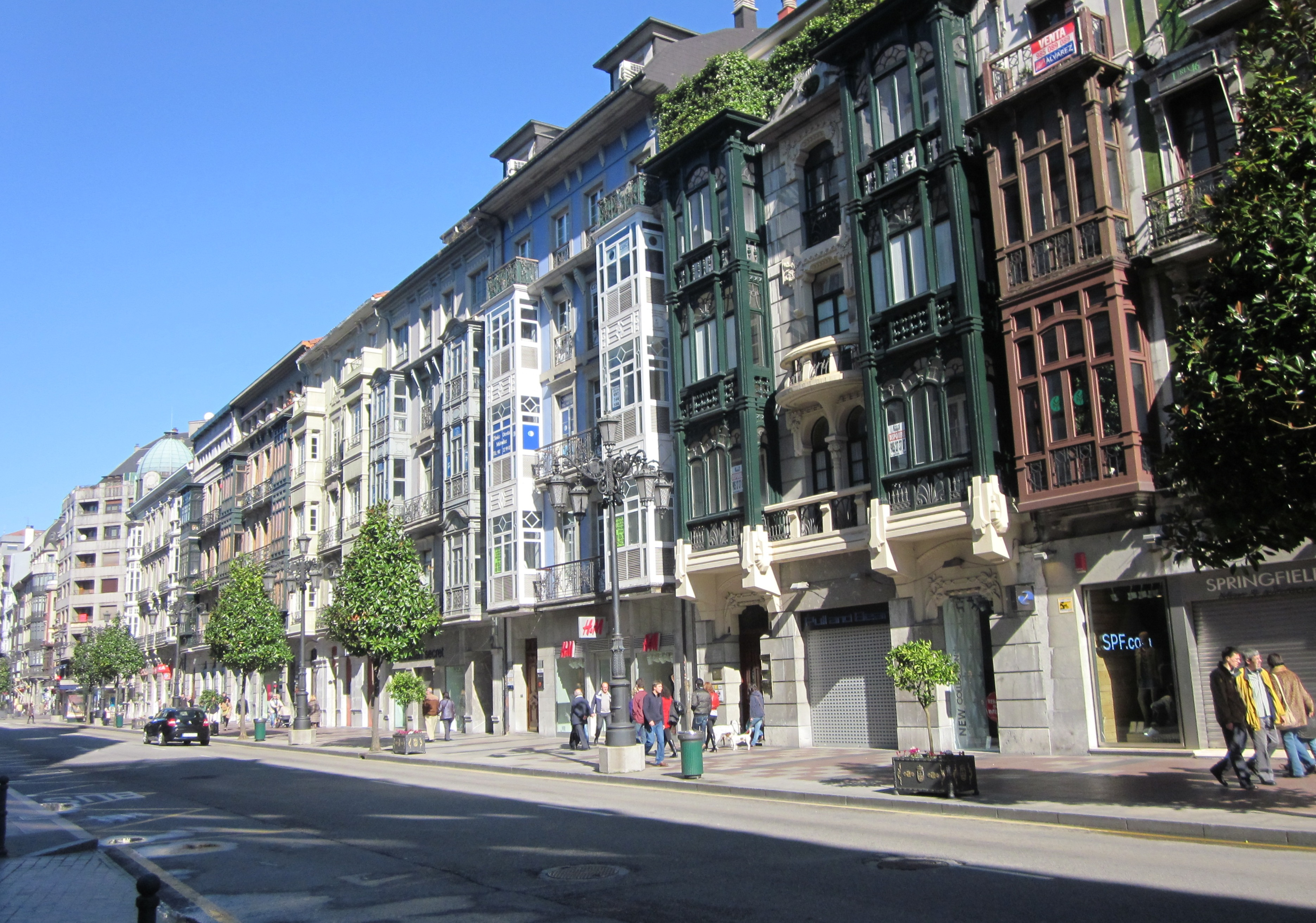 Vista de la Calle de Uría de Oviedo. Principado de Asturias. España.